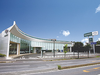 名古屋トヨペット 豊田土橋店の外観